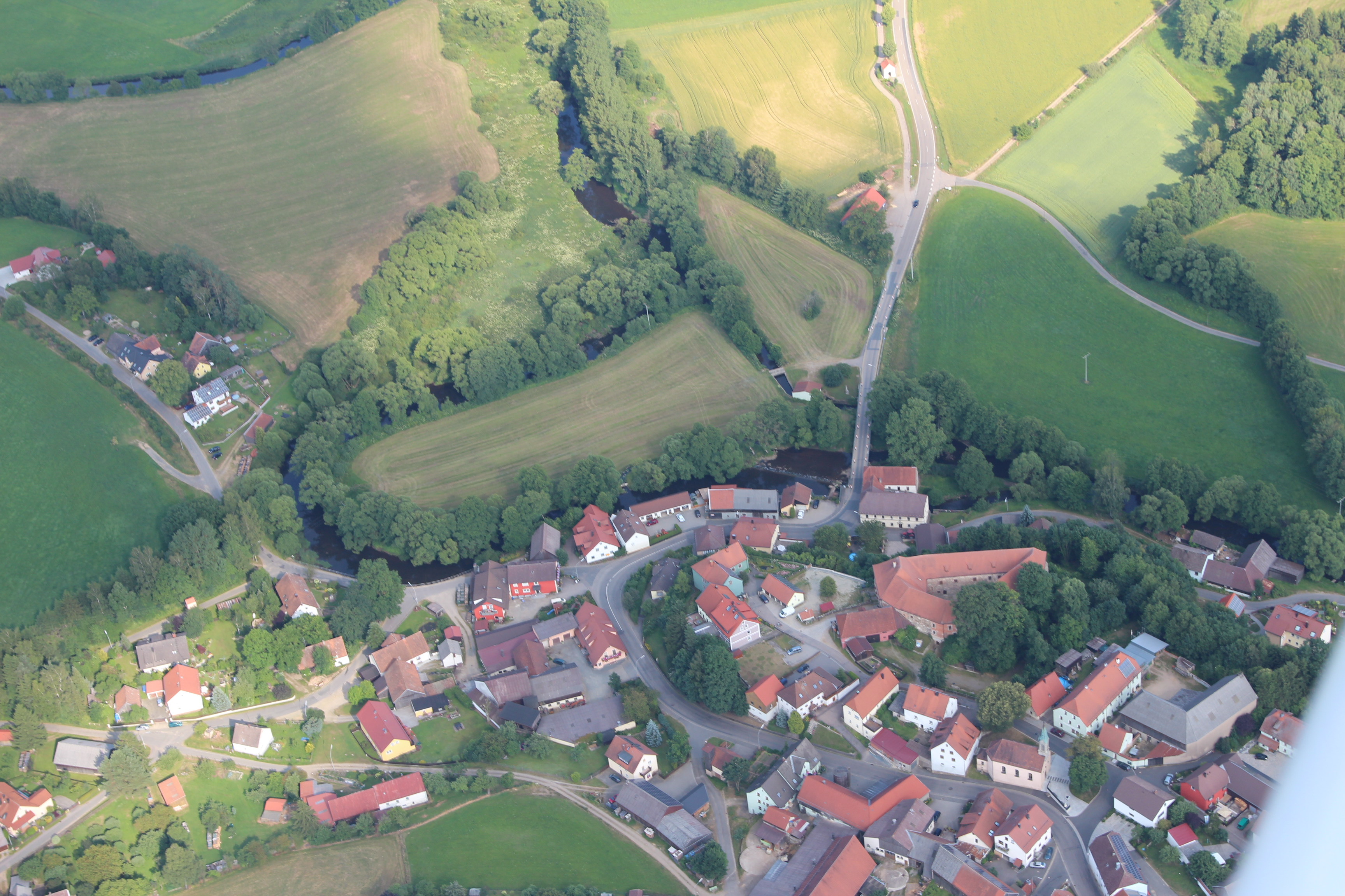 Ortskern von Burgtreswitz mit dem Schloss; Marktgemeinde Moosbach, Landkreis Neustadt an der Waldnaab, Oberpfalz, Bayern (2013)